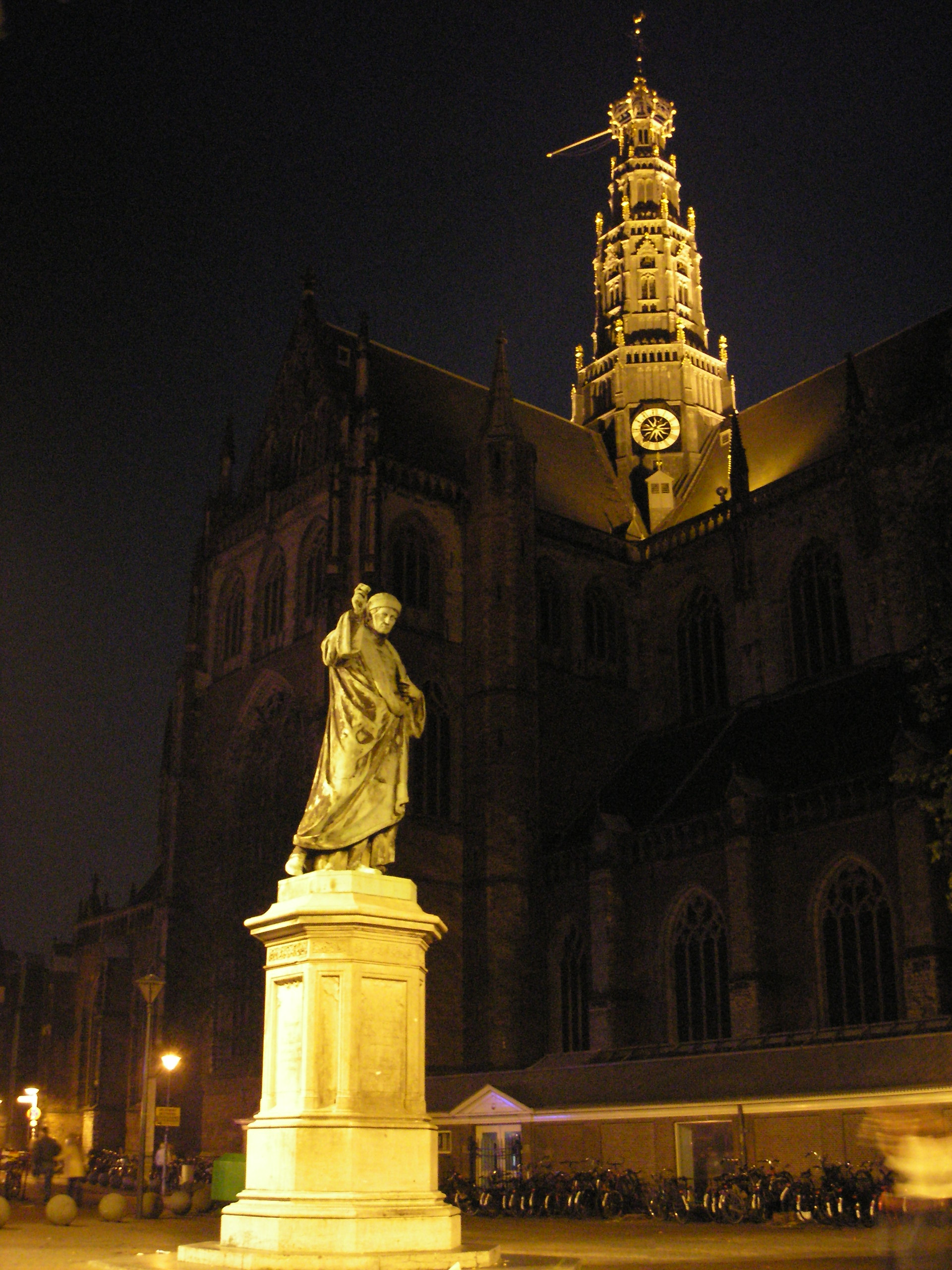 Grote Markt en Grote Kerk bij nacht, Haarlem, Netherlands